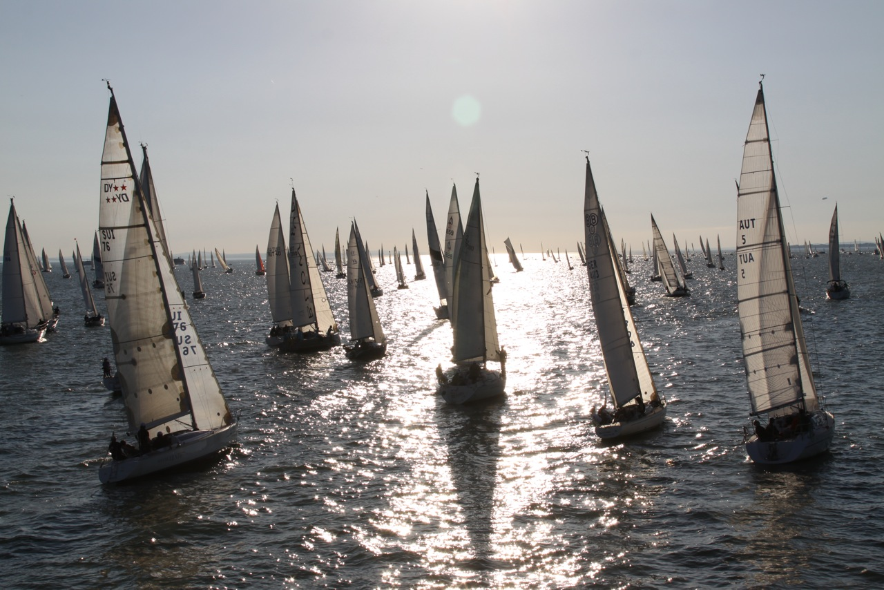 Rundum2010_Feld vom Startschiff